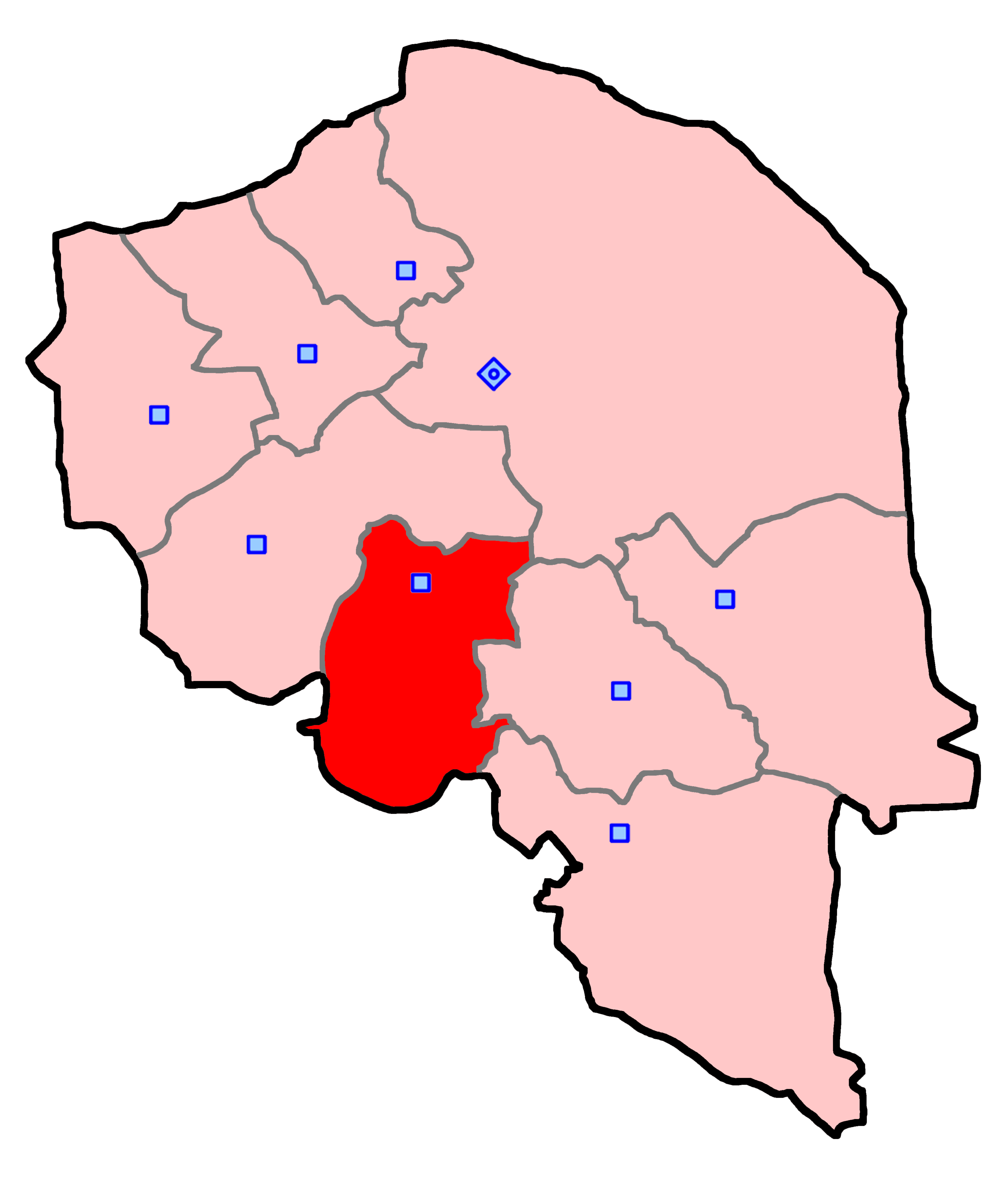 ارزوئیه، بافت و رابر برای انتخابات مجلس شورای اسلامی